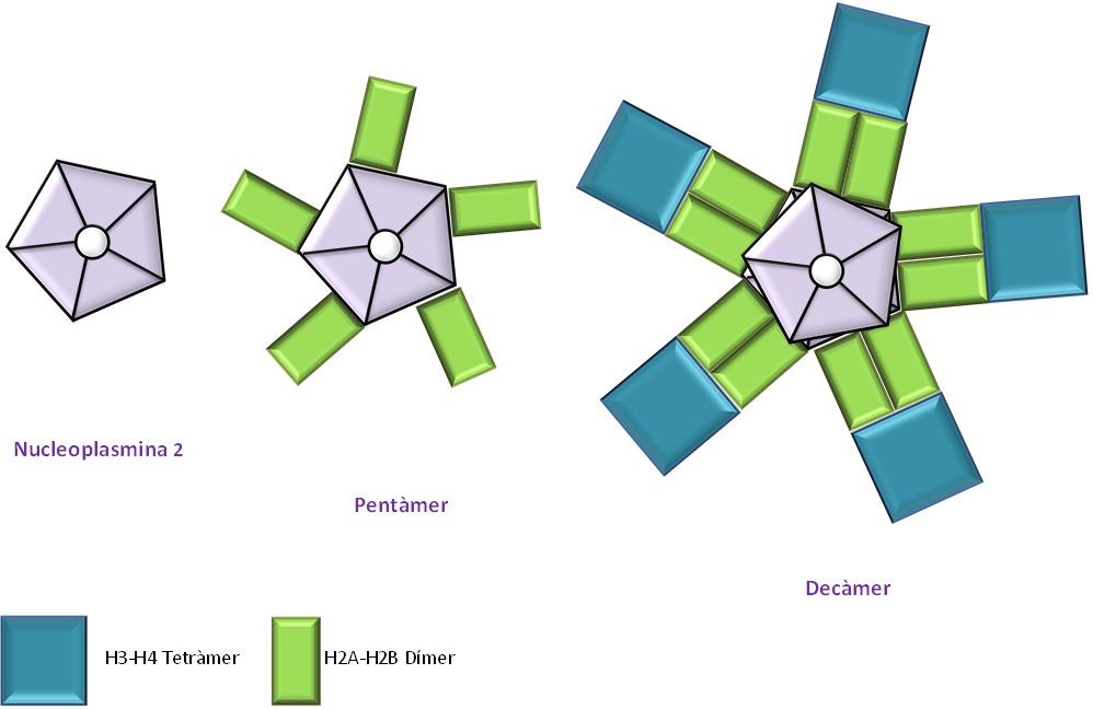 La Npm2 en humans forma decàmers quan ha d’unir dímers d’H2A-H2B i tetràmers H3-H4 simultàniament. En absència de tetràmers d’histones, aquesta xaperona uneix els dímers d’H2A-H2B amb un únic pentàmer formant l'eix central.